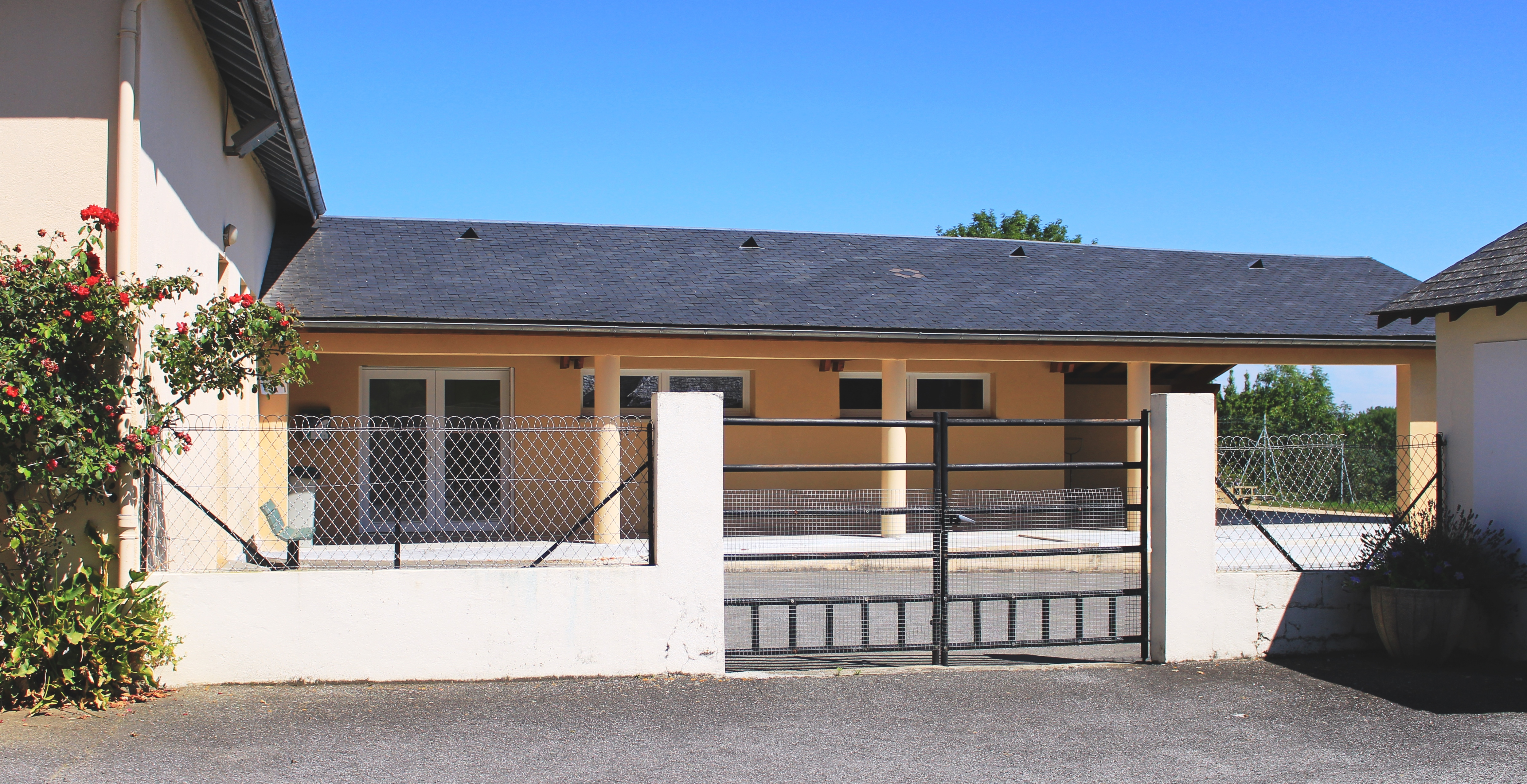 École de Lutilhous (Hautes-Pyrénées)